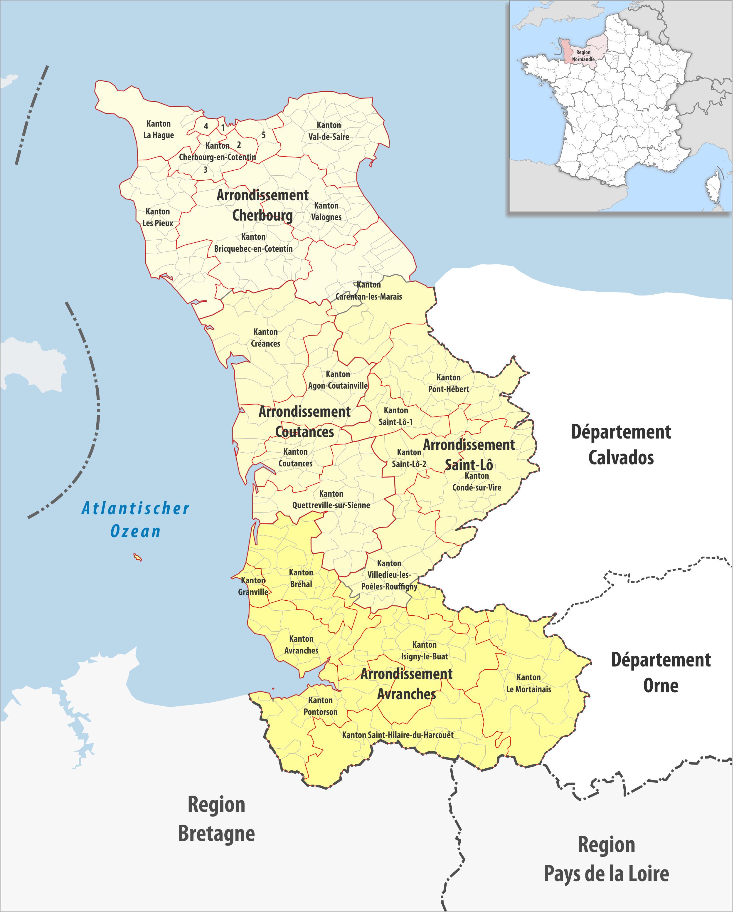 Gemeinden, Kantone und Arrondissemente im Departement Manche